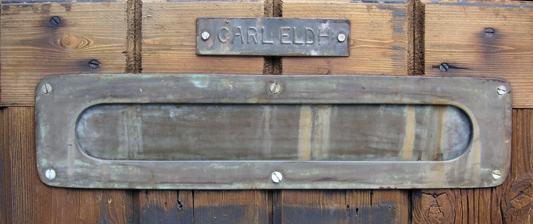 Carl Eldhs brevinkast vid Ateljémuseet i Stockholm